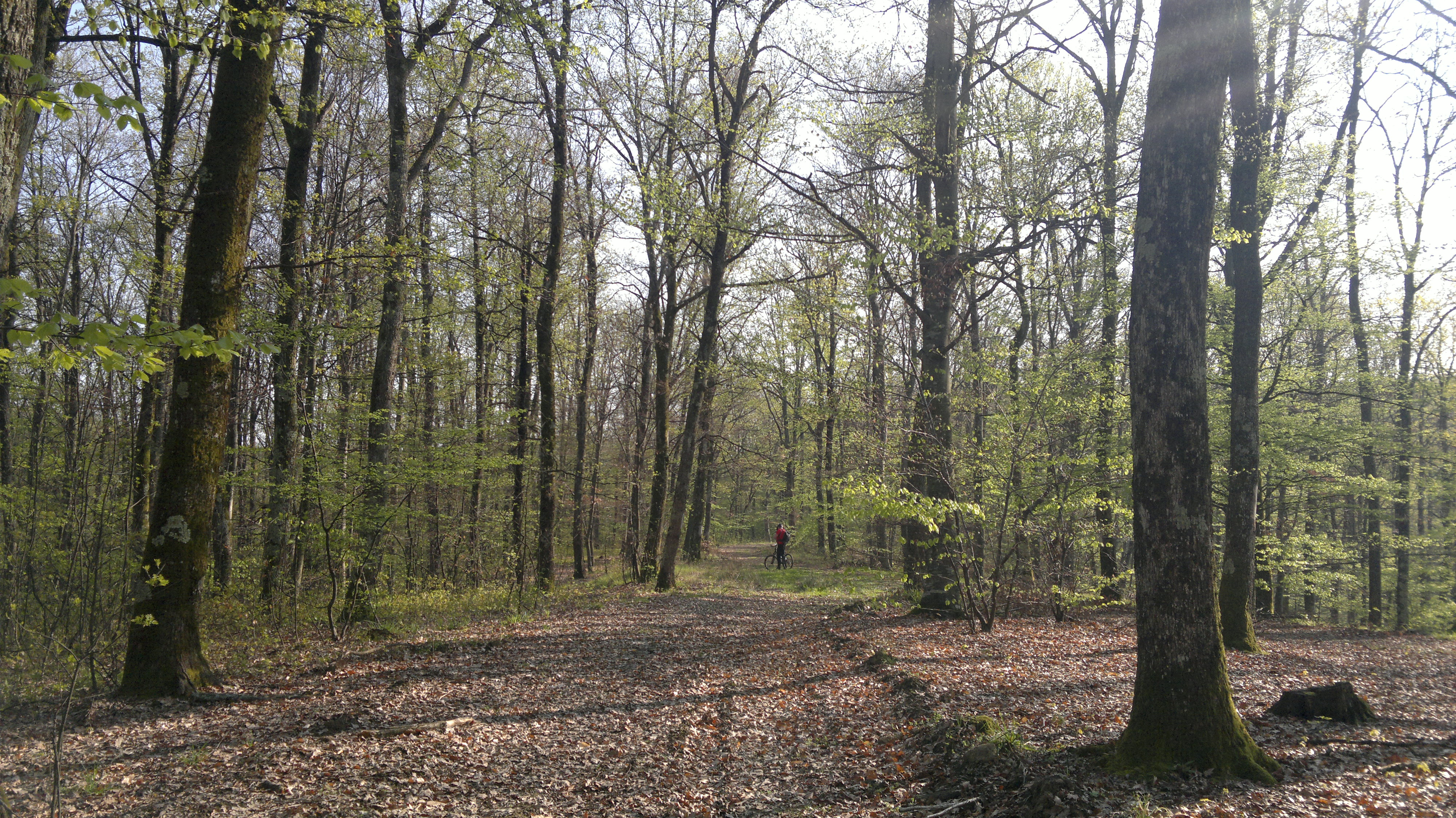 Dervišaga, Croatia